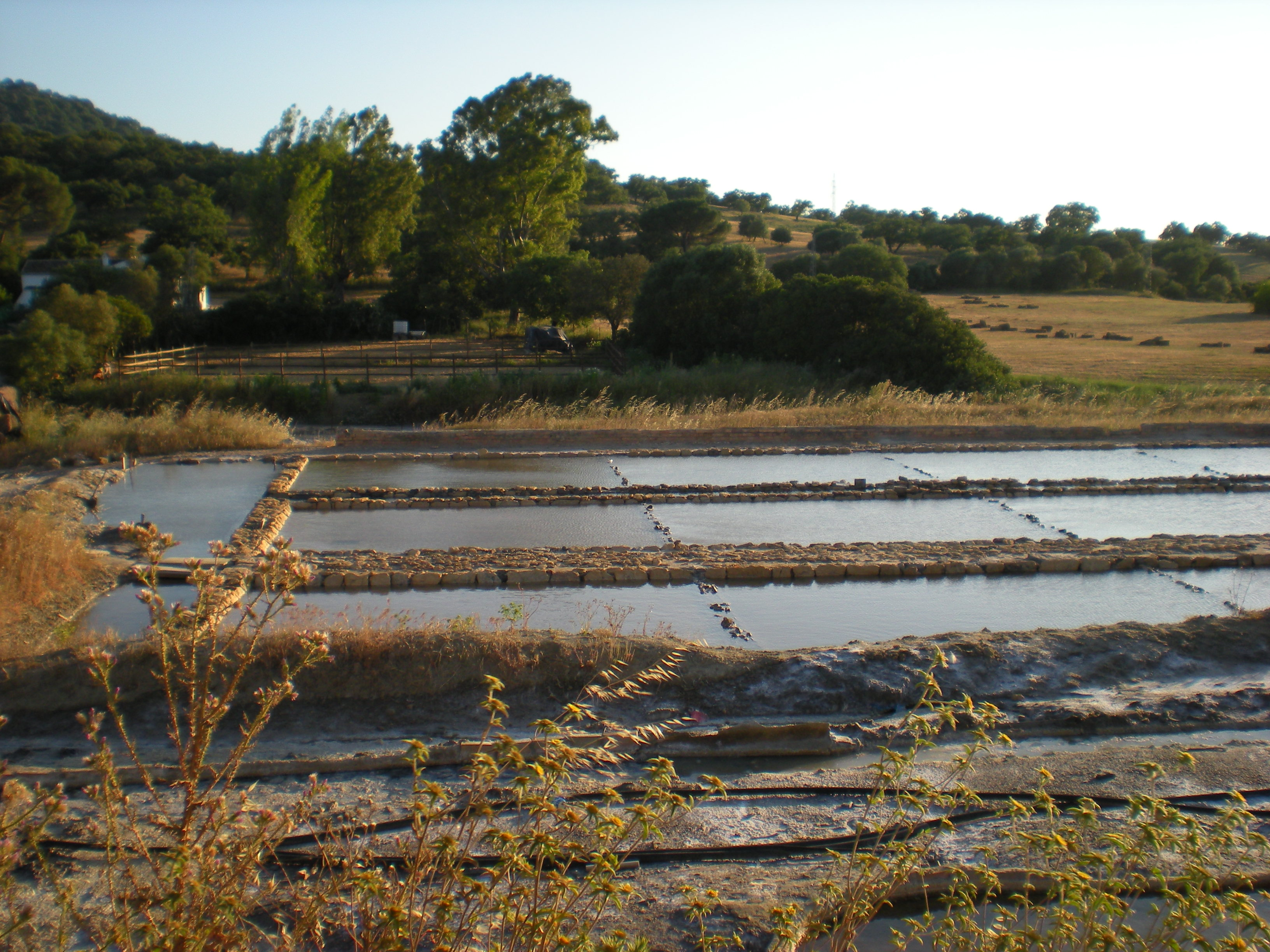 Salinas de Hortales en el término municipal de Prado del Rey, Andalucía.